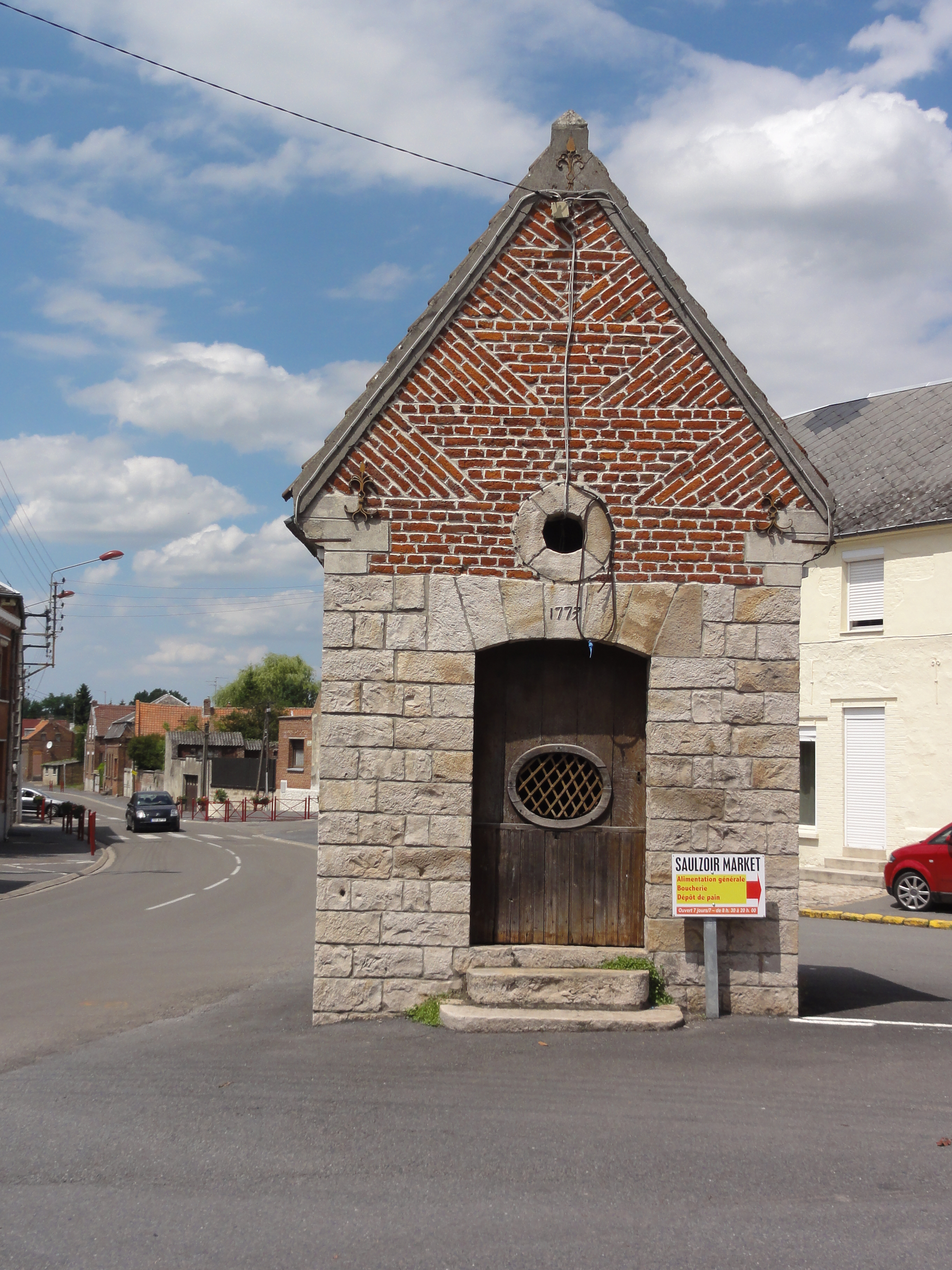 Saulzoir (Nord, Fr) chapelle 1773.